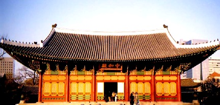 Deoksugung Palace